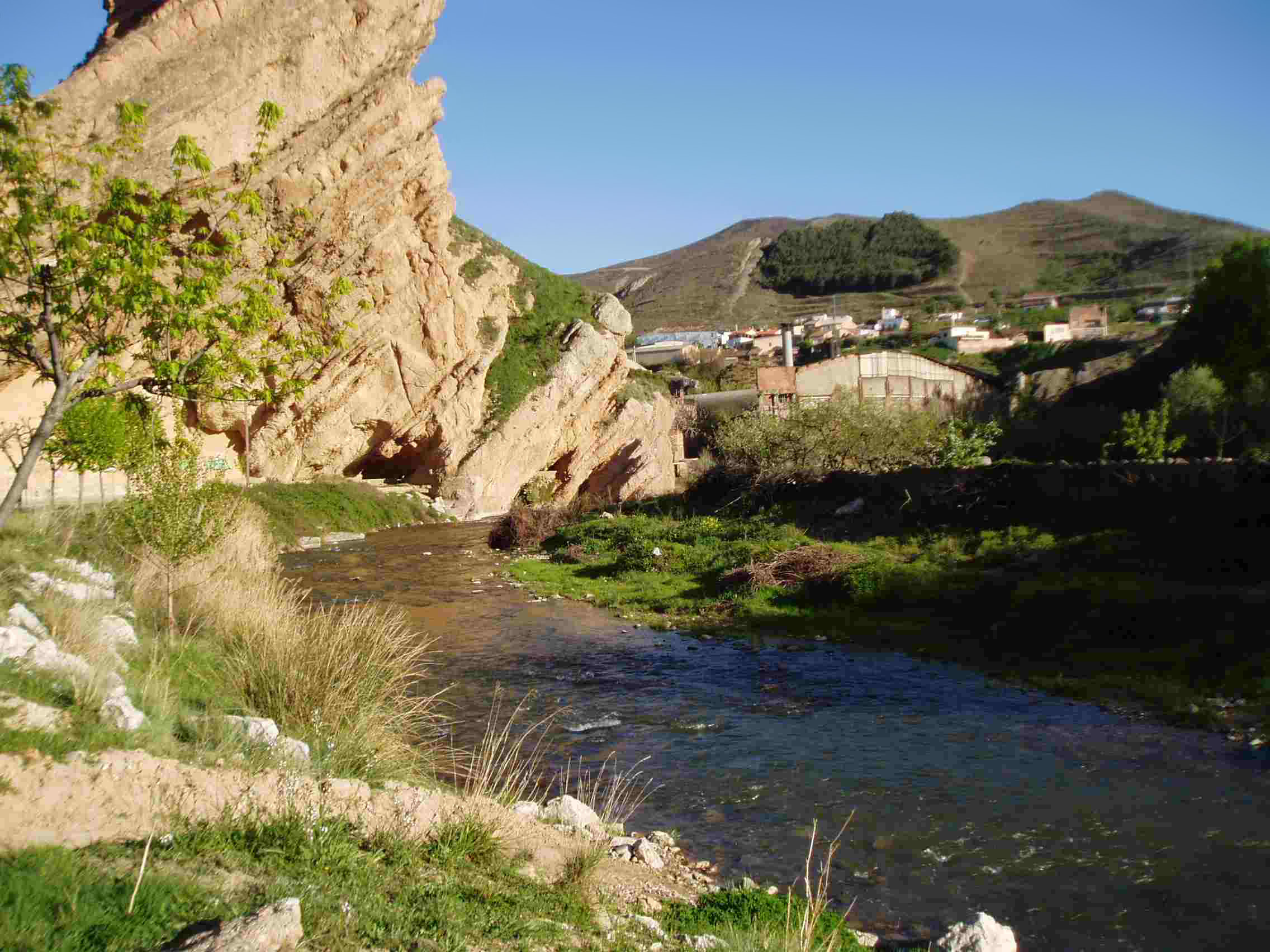 Autol, La Rioja, Spain